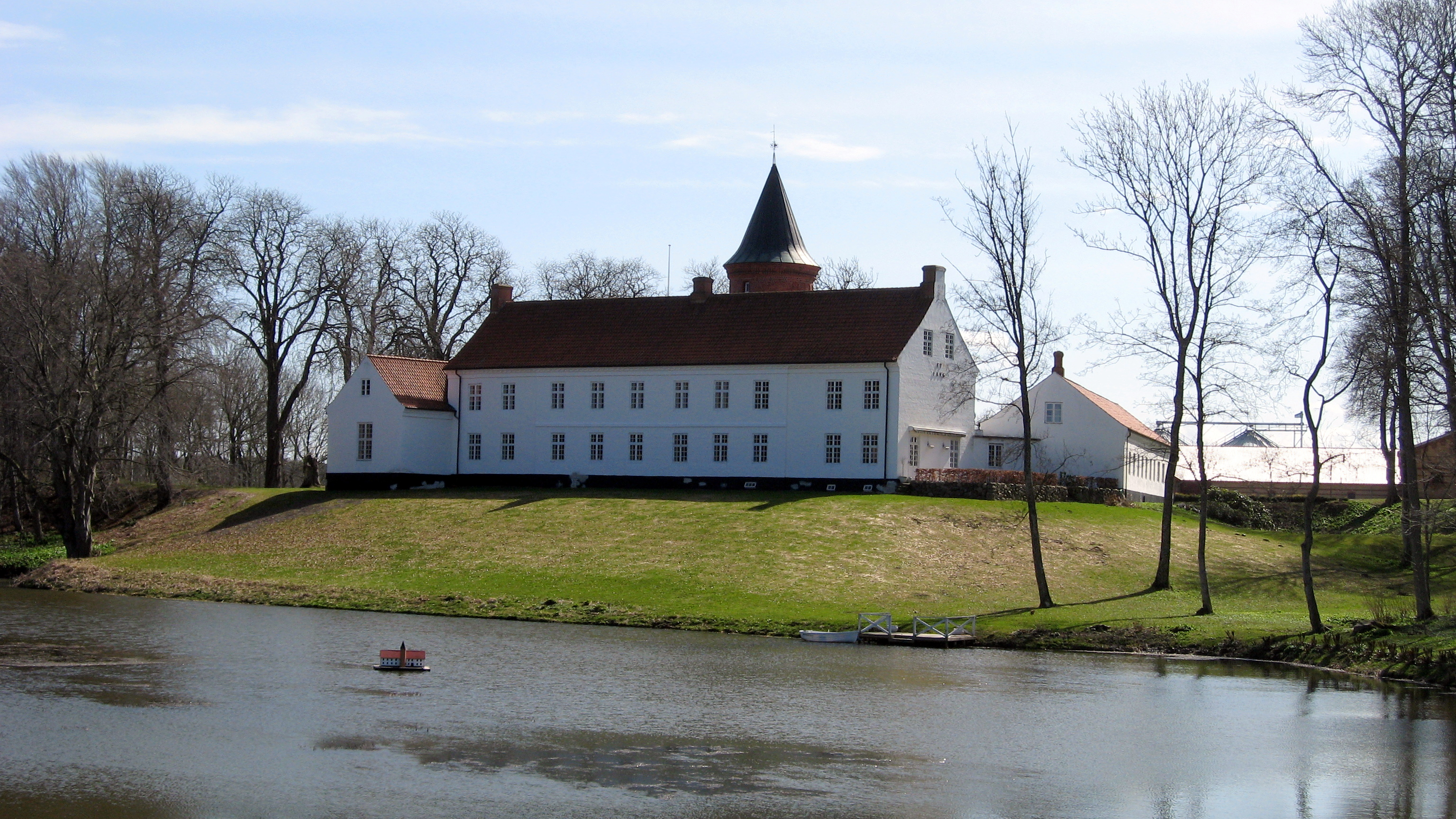 Høgholt herregård, Hørmested Sogn, Hjørring Kommune